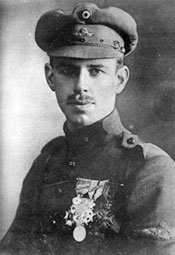 Edmond Thieffry első világháborús belga ászpilóta